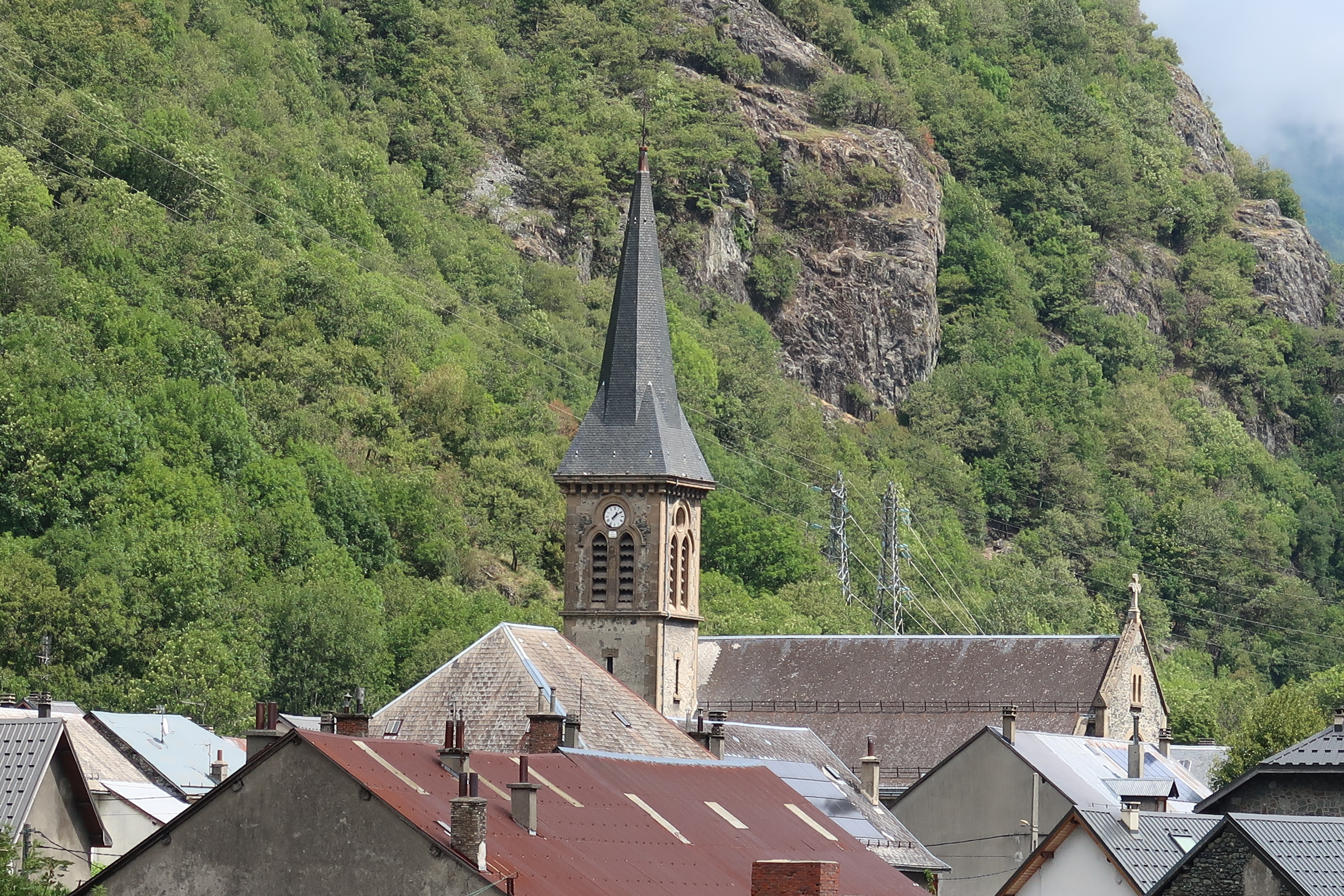 Clocher de l'église Saint-Antoine de Livet en août 2019